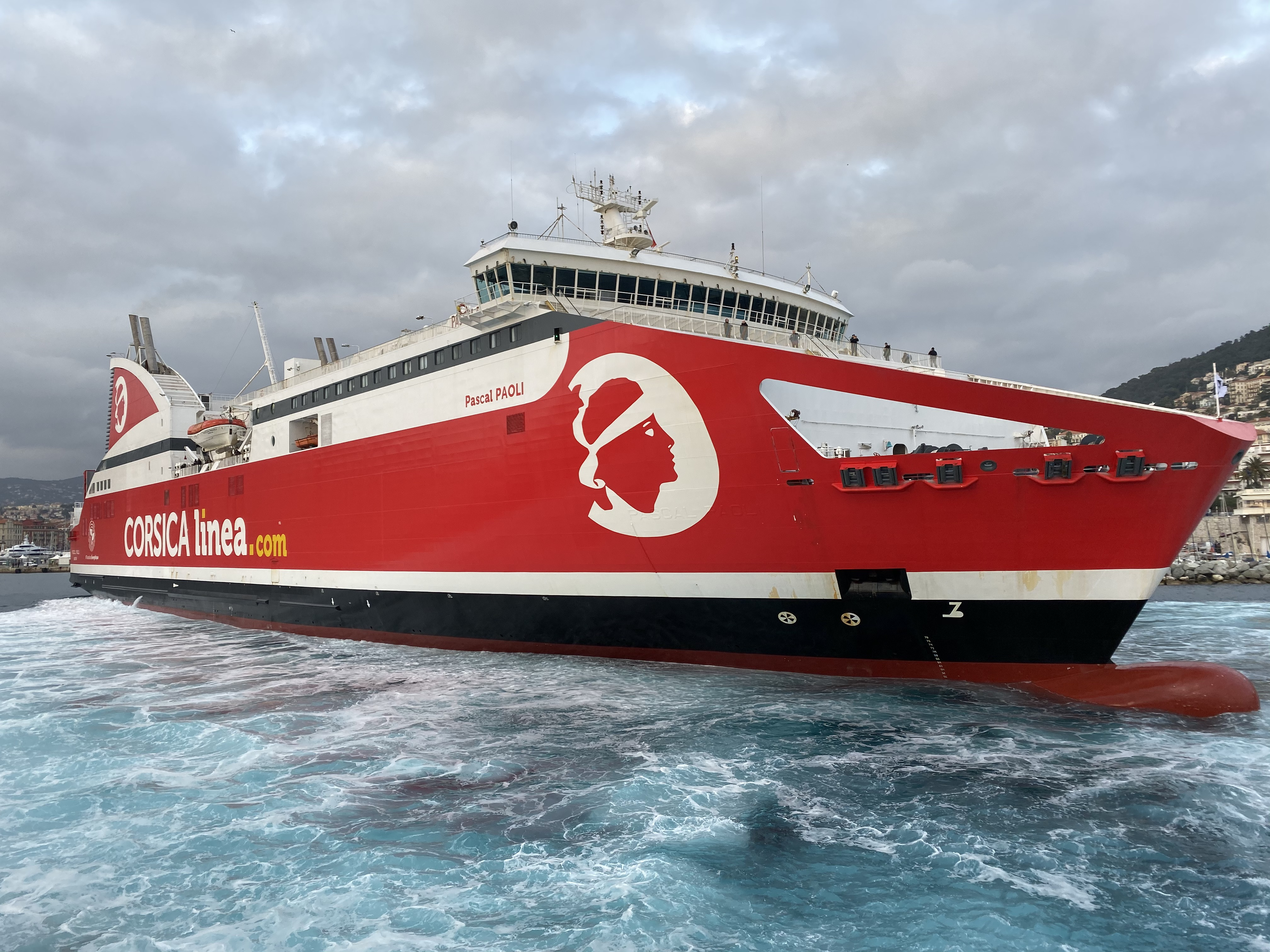 Arrivée à Nice du navire mixte Pascal Paoli de la compagnie Corsica Linea.